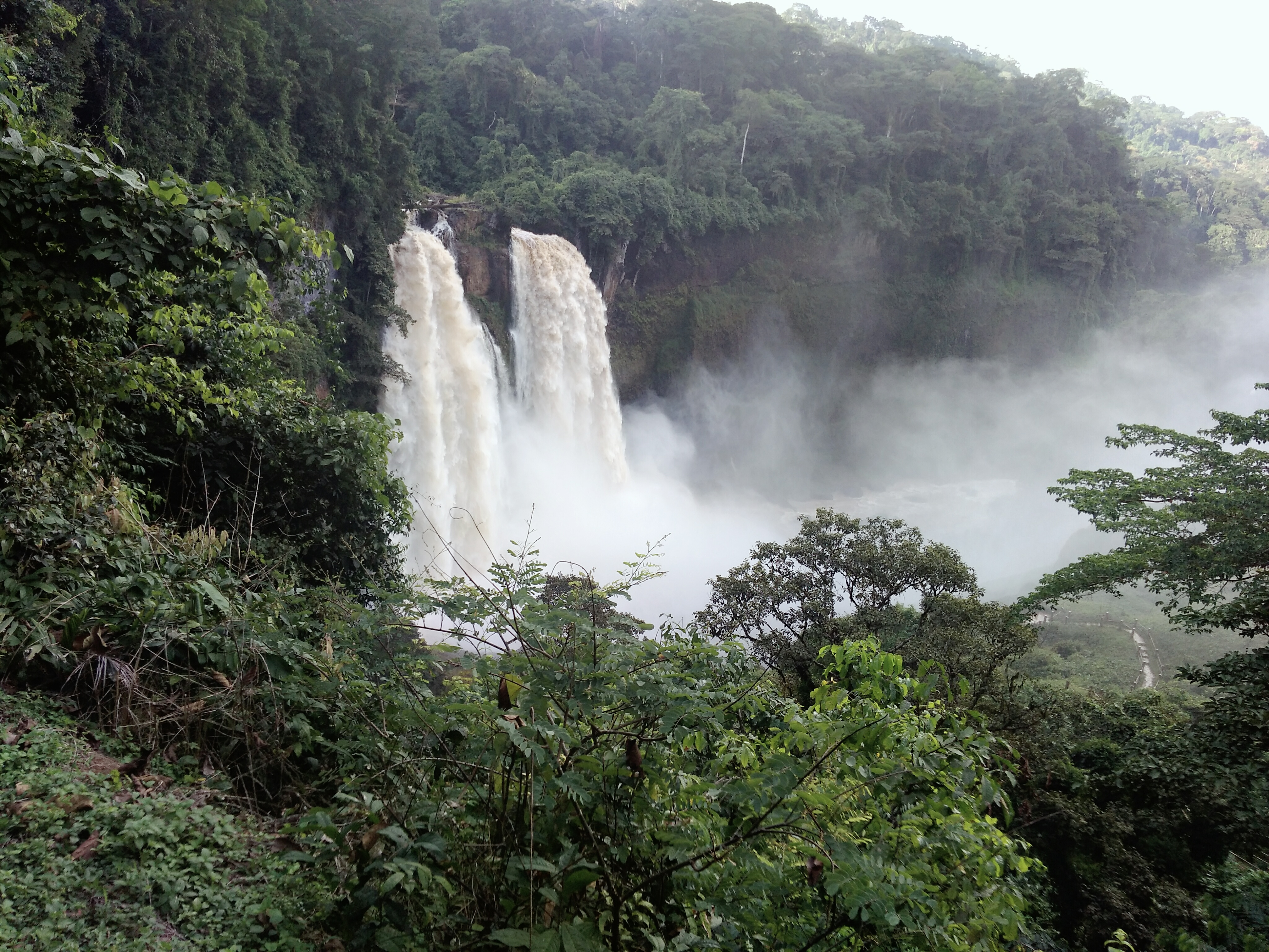 Chûtes-d-Ekom-Nkam. Cette image présente les chûtes d'Ekom-Nkam, situées à proximité de la ville de Melong , dans la région du Littoral